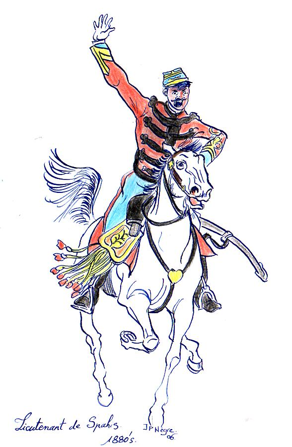 dessin personnel de Jp.negre